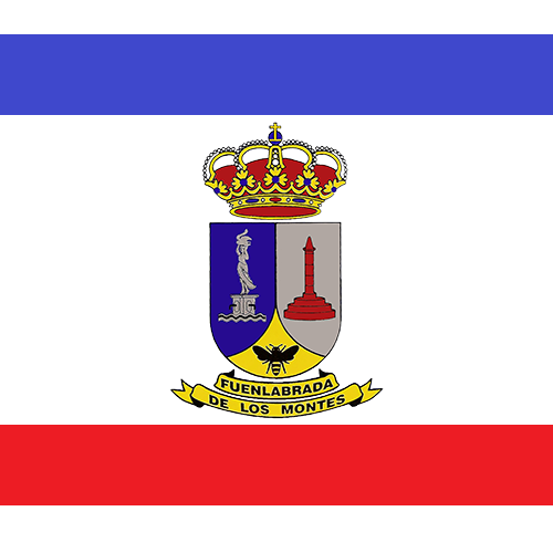 Bandera de la localidad pacense de Fuenlabrada De Los Montes